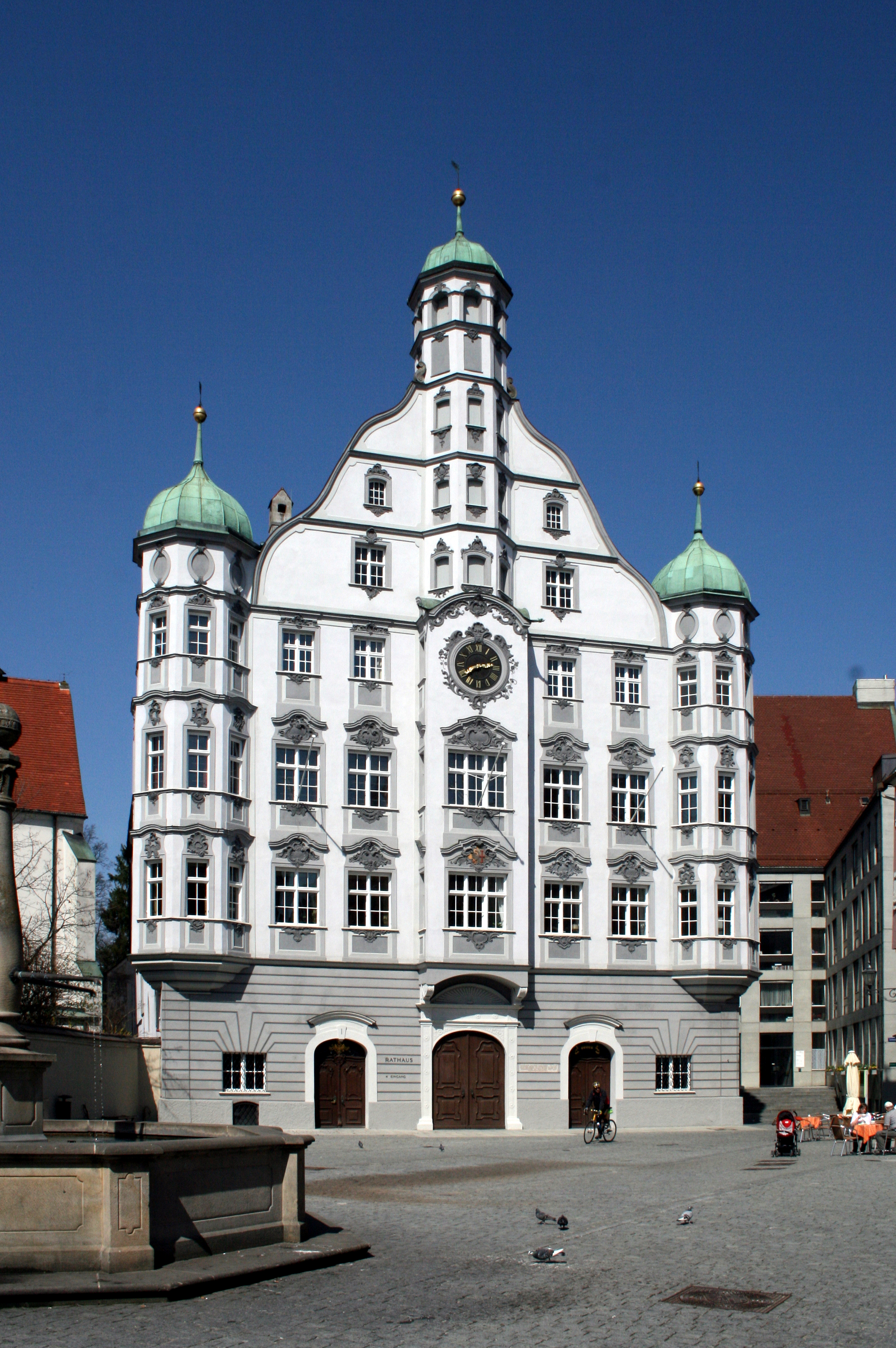 Memminger Rathaus